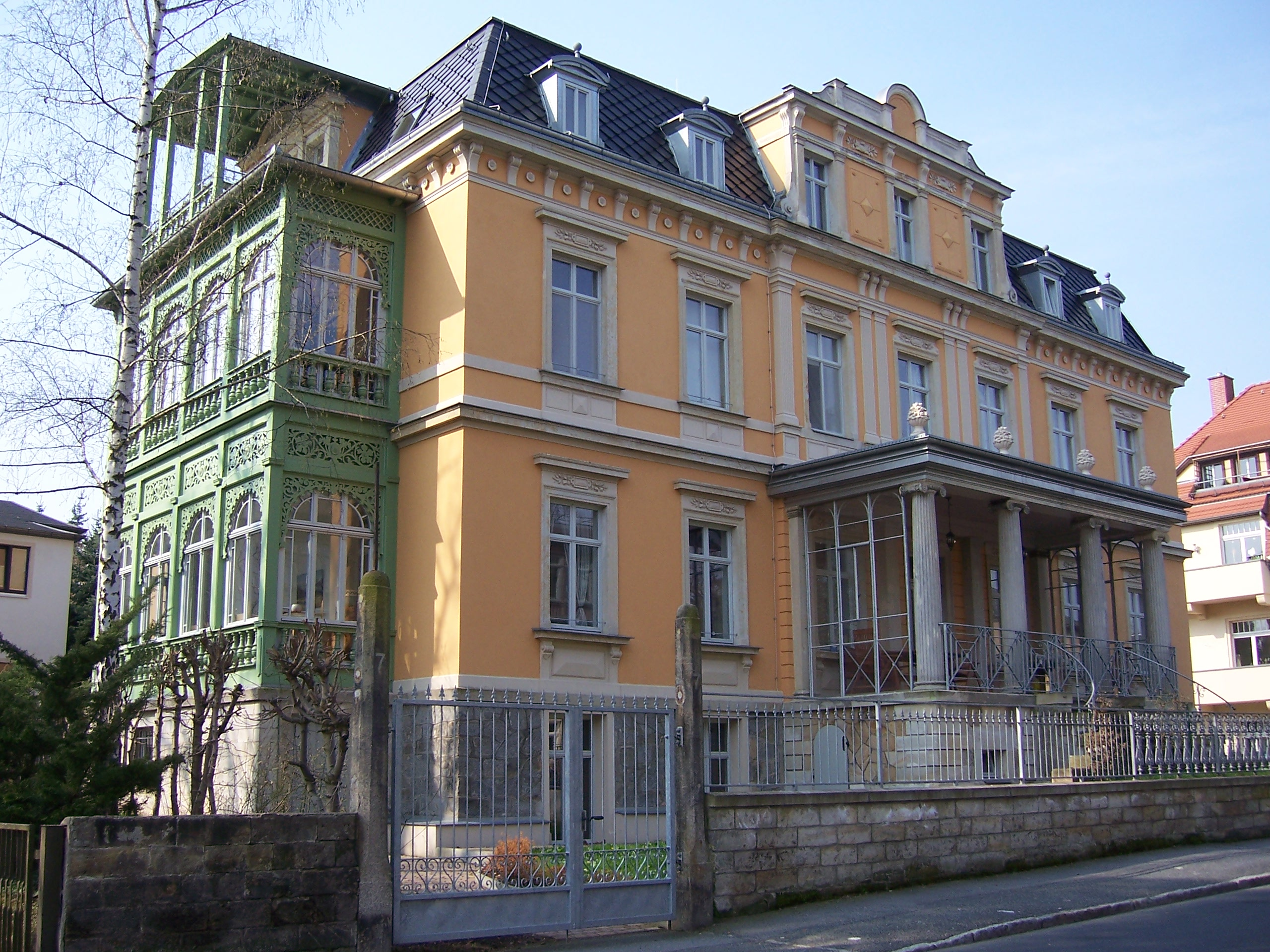 Die Bürgerschenke in Dresden-Klotzsche mit den integrierten vier Säulen des ehemaligen Café Reale auf der Brühlschen Terrasse.